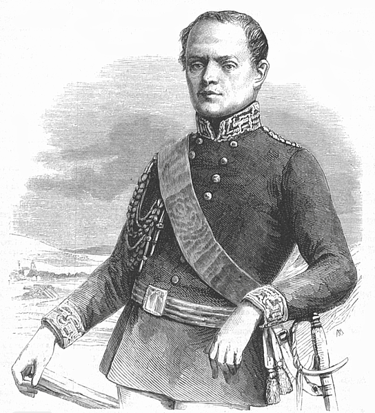 Wojciech Chrzanowski